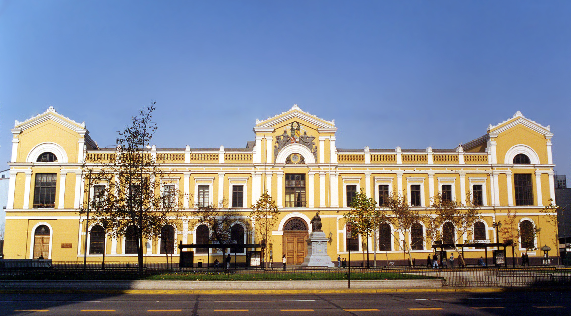 En 1872 fue inaugurado este edificio de fachada neoclásica que se extiende por la Alameda Bernardo O’Higgins entre las calles Arturo Prat y San Diego101 . El diseño es obra de Lucien Ambroise Hénault y fue la primera de muchas obras que el estado chileno le encomendó a este arquitecto francés. La construcción estuvo a cargo de Fermín Vivaceta.